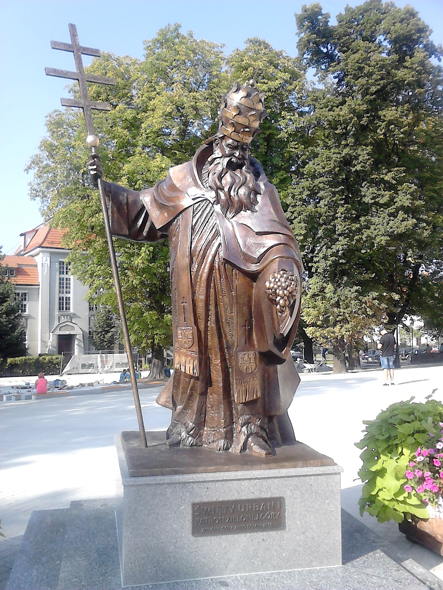 Pomnik św. Urbana I Patrona Zielonej Góry